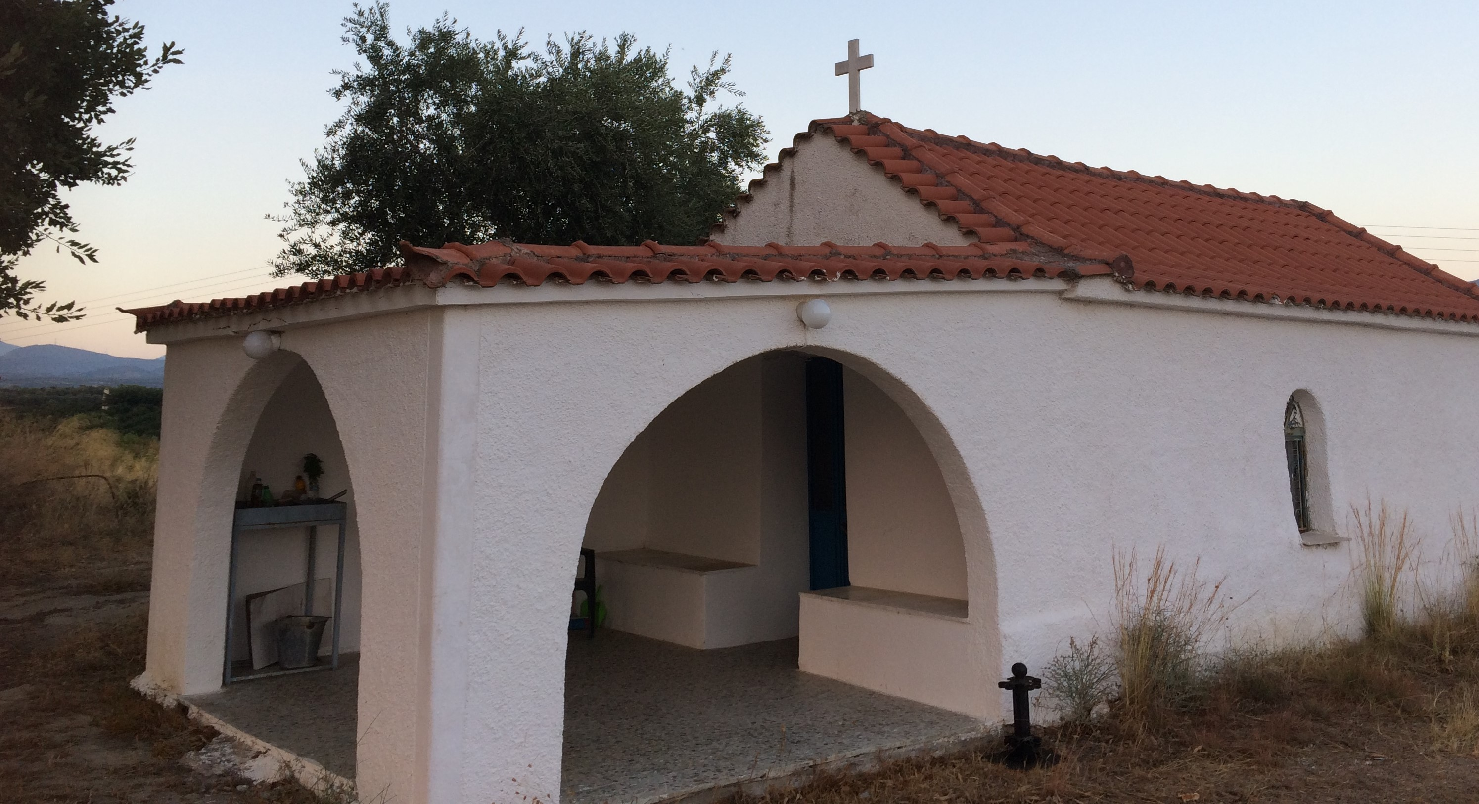 Αγιος Ευστράτιος (όψη 1), Αστέρι Λακωνίας